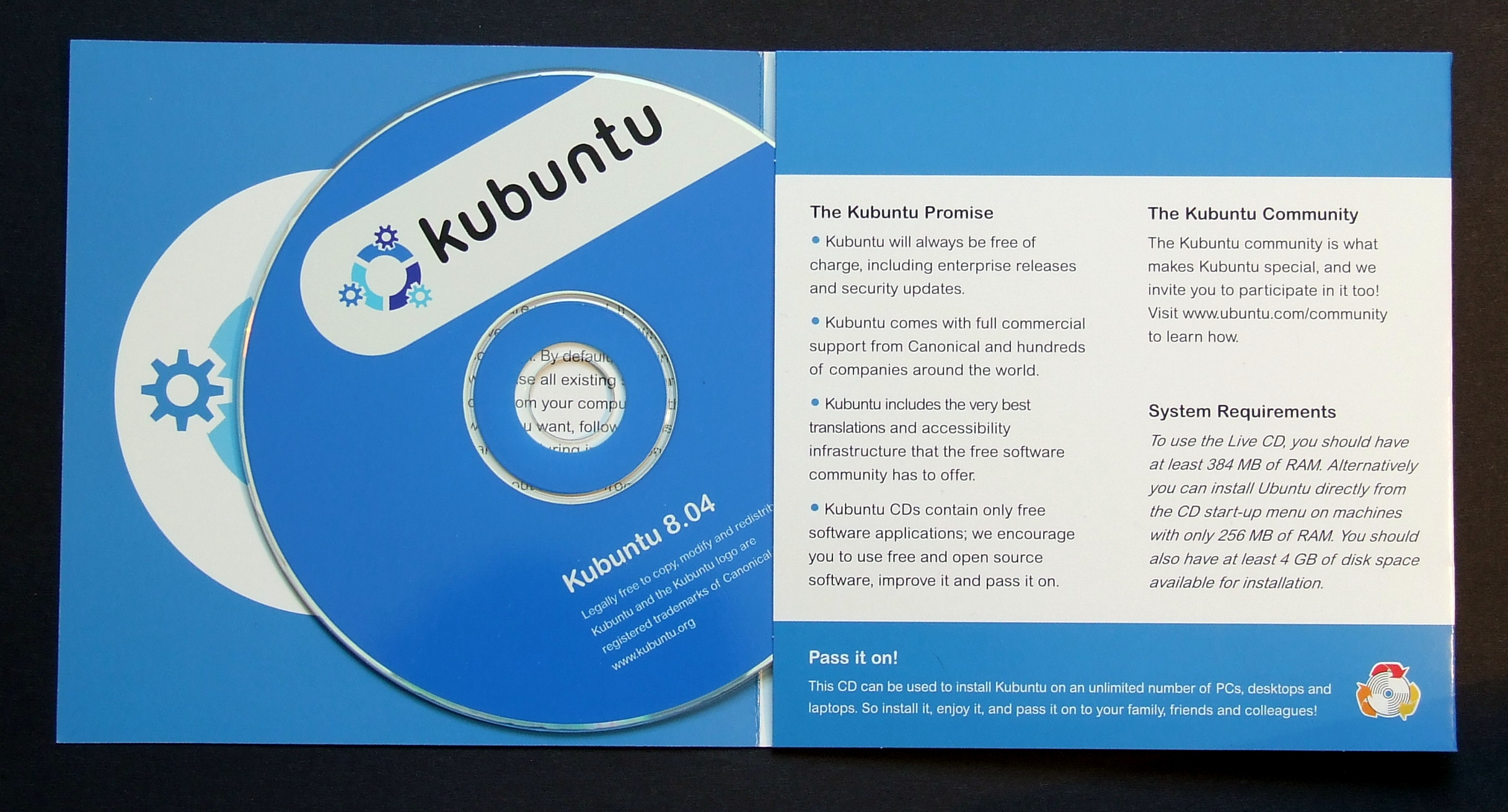 Licensing: This image or multimedia was created by Bartosz Senderek. The image or audio is licensed under CC-BY license. Attribution to me is required. Licencja: Ten obrazek lub plik multimedialny został stworzony przez Barotsza Senderka. Został on udostępniony na licencji CC-BY. Informacja o moim autorstwie jest wymagana. "I want to use the image/multimedia. How can I do that?" You can use this image/multimedia freely for any purpose, including commercial use, provided that you license it under the above license. My suggestion is to use text shown below: If you use the image I would appreciate it if you would let me know on my talk page, but this is not required as long as you follow the above license. "Chcę użyć tego pliku. Jak mogę to zrobić?" Możesz używać tej grafiki/multimediów darmowo w każdym celu, włączając użycie komercyjne, udostępniając go dalej na powyższej licencji. Jeśli zdecydujesz się na publikację zdjęcia mojego autorstwa obowiązkowo podpisz go w sposób podany w sekcji "Licensing text". Jeżeli użyłeś mojego pliku możesz powiadomić mnie o tym na mojej stronie dyskusji, lecz nie jest to wymagane, dopóki trzymasz się powyższej licencji.